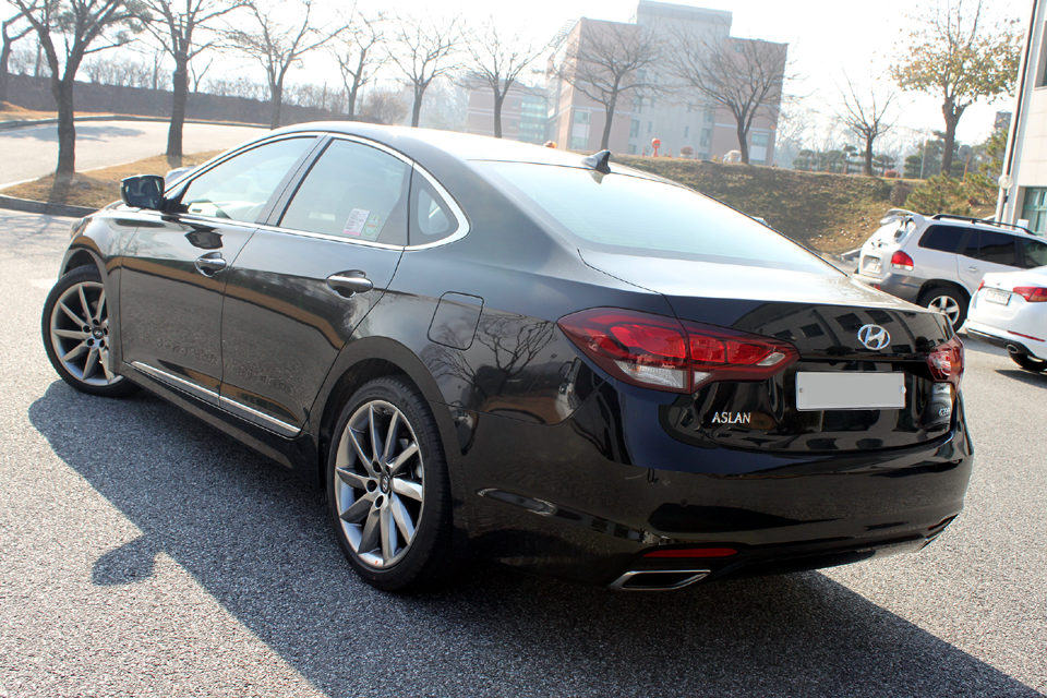 Hyundai Aslan